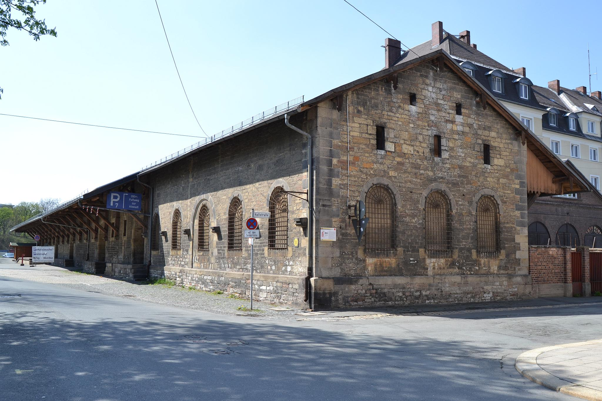 ehemaliger bayerischer Güterschuppen des Alten Bahnhofs in Hof